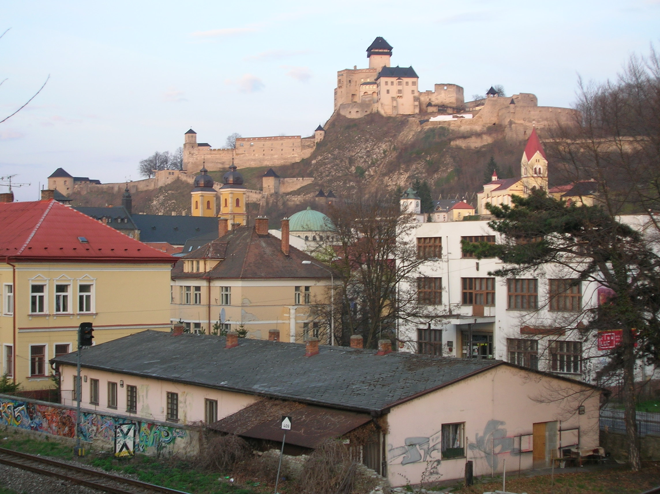 pamiatky mesta Trenčín: synagóga (zelená kopula), Piaristický kostol sv. Františka Xaverského (vľavo, dve veže), Dolná brána (mestská veža), Farský kostol Narodenia Panny Márie (vpravo vzadu, červená strecha veže), Trenčiansky hrad (v strede vzadu)